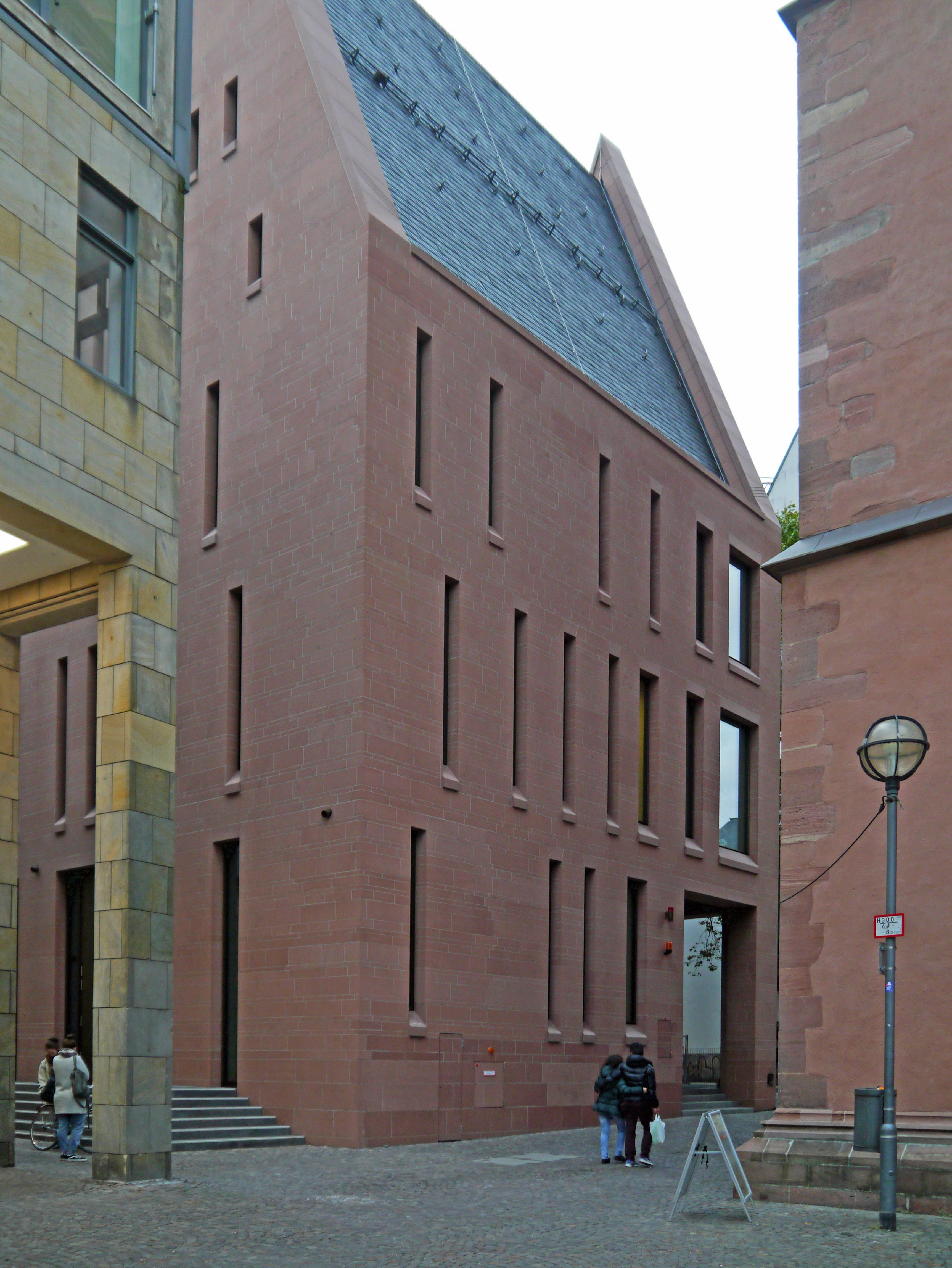 Blick vom Weckmarkt auf das Stadthaus (2016), zwischen Schirn und Dom.